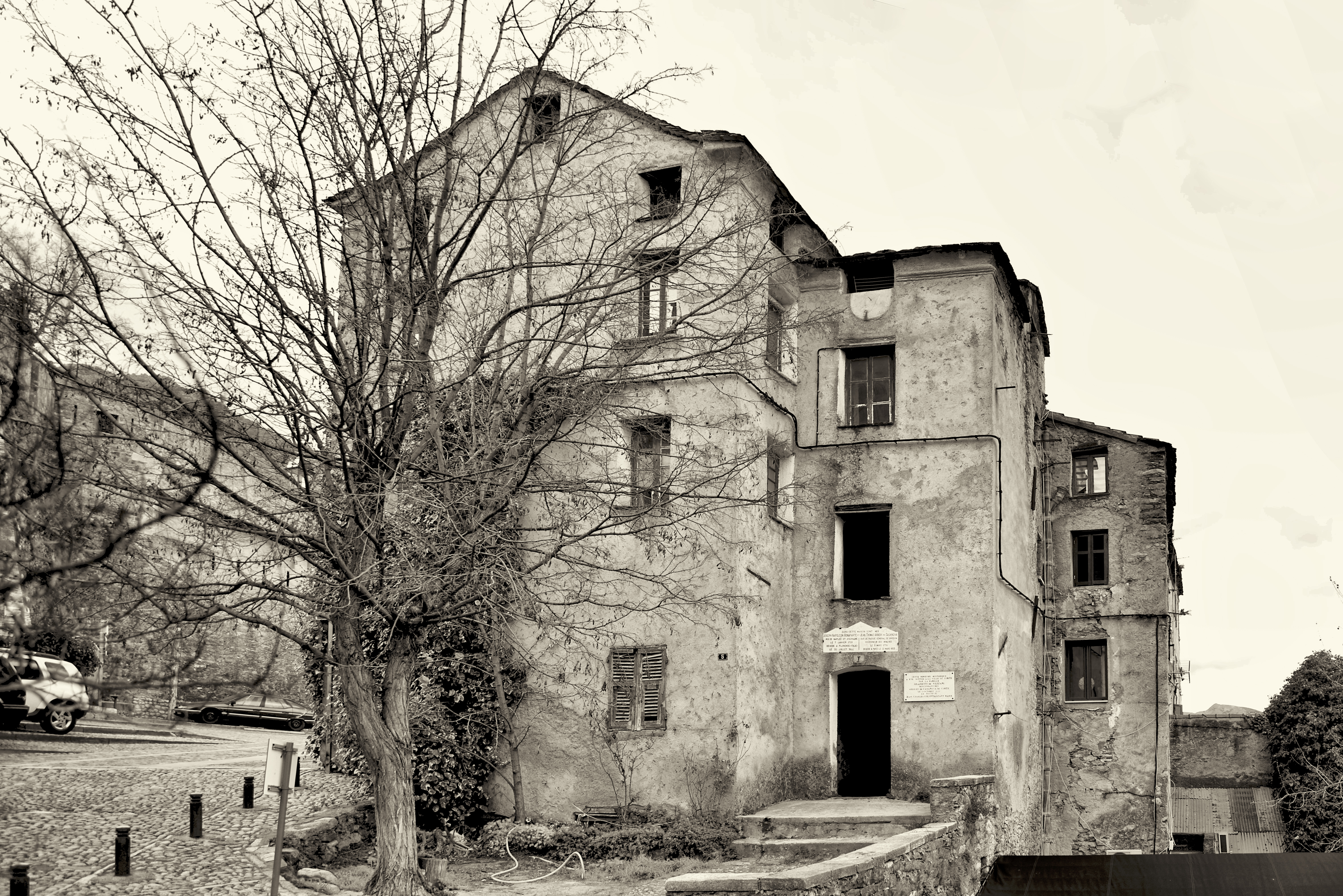 Corte, Centre Corse - Maison Arrighi de Casanova sous la citadelle, où vécut le père de Napoléon Ier en 1768 et où sont nés le 7 janvier 1768, Joseph Napoléon Bonaparte, roi de Naples et d'Espagne, et le 8 mars 1778 Jean joseph Arrighi de Casanova, Duc de Padoue, général de division.